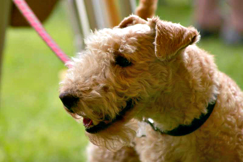 A Lakeland Terrier.